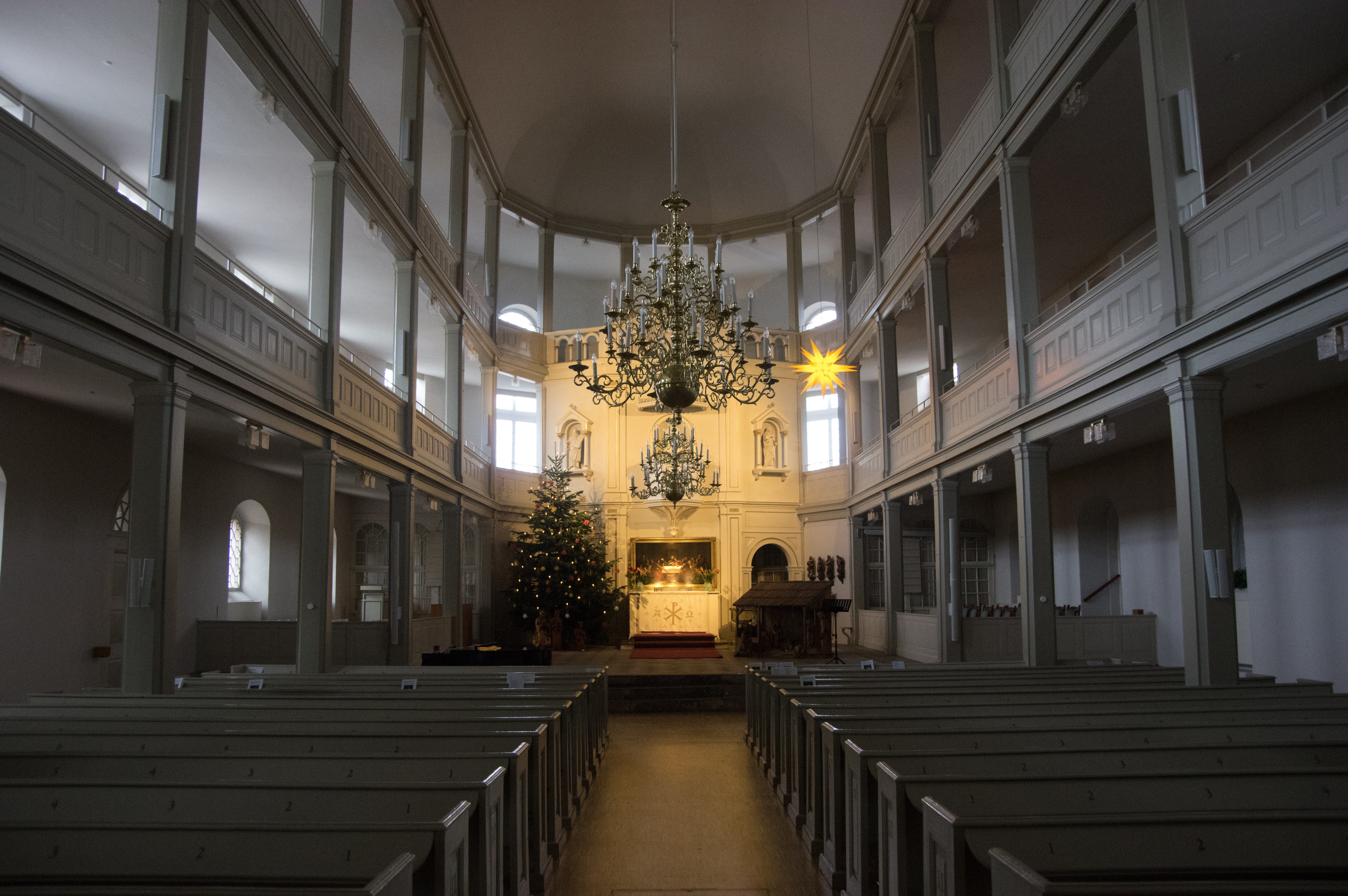 Walsrode in Niedersachsen. Die Stadtkirche steht unter Denkmalschutz.